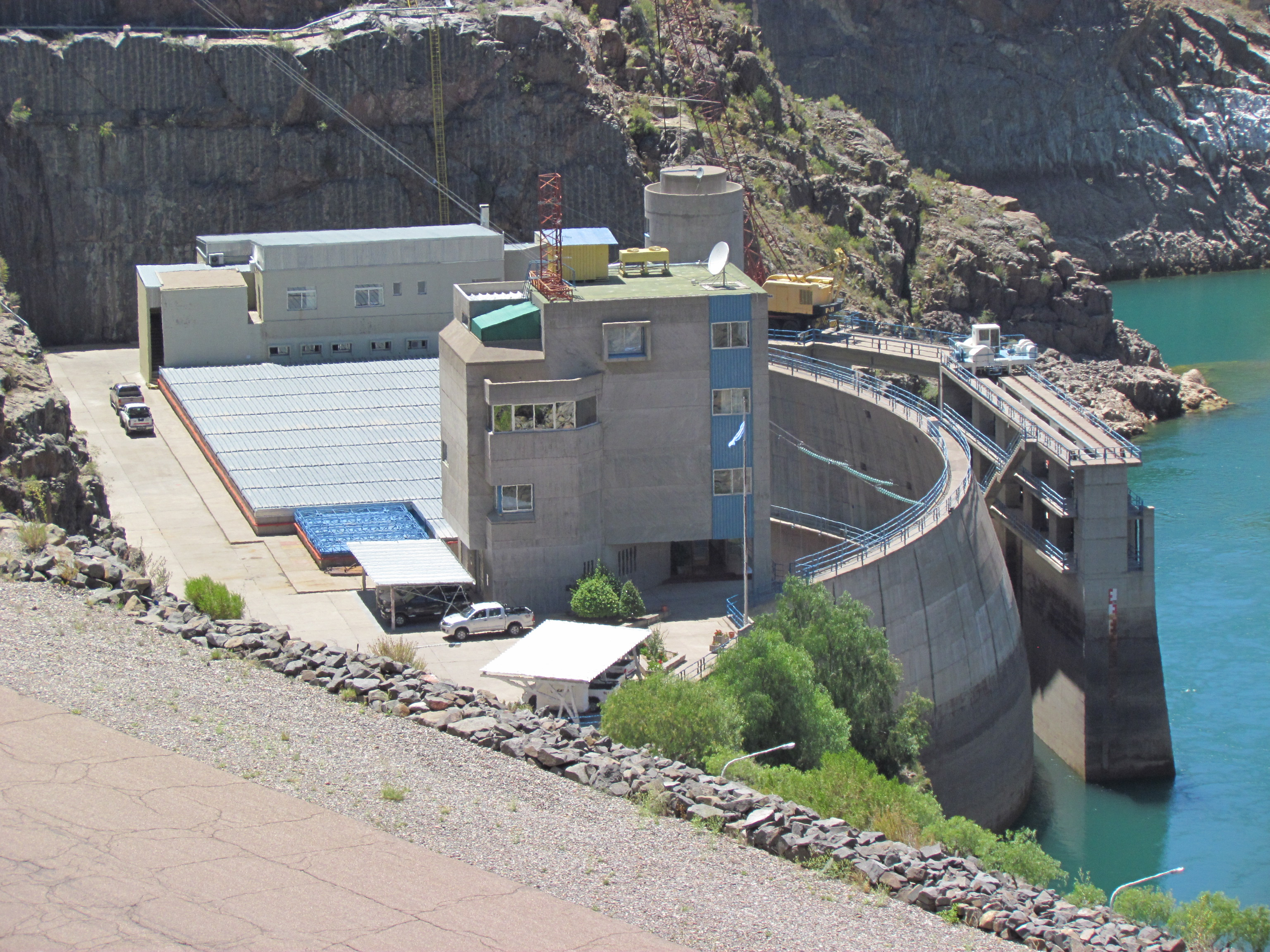 Central hidroeléctrica Los Reyunos